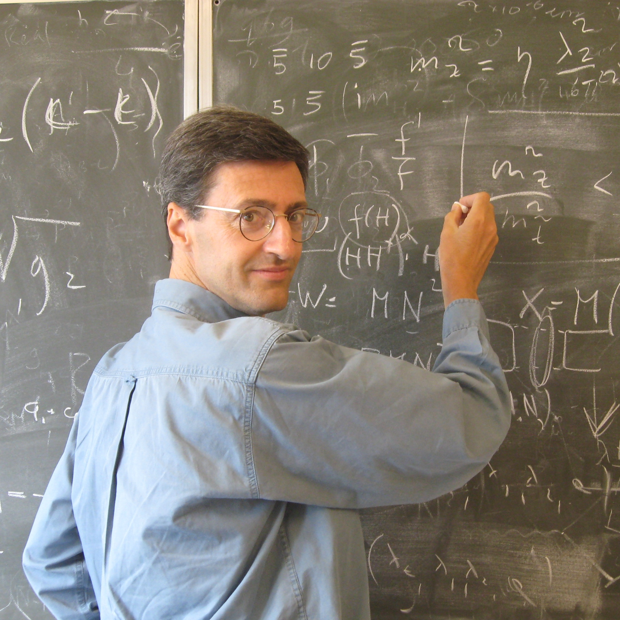 Gian Francesco Giudice nel suo ufficio al CERN il 17 luglio 2011.